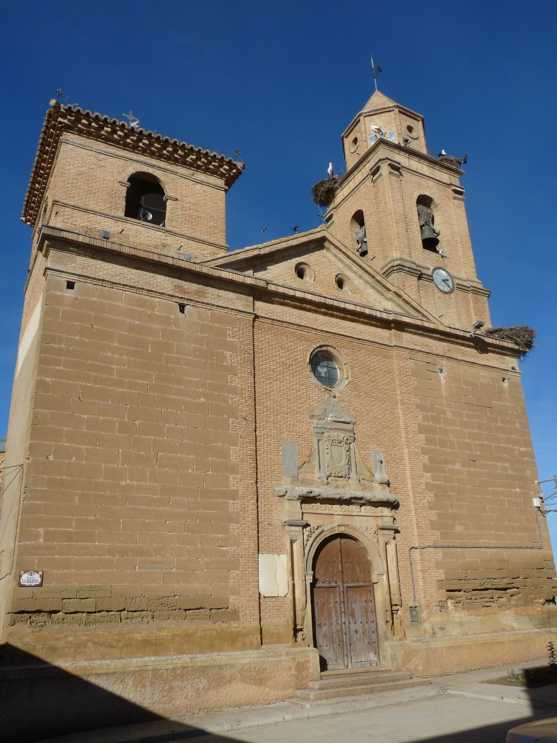 Sangarrén - Iglesia parroquial de San Francisco de Asís (s. XVIII)